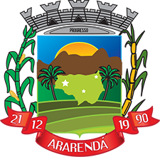 Brasão da Prefeitura Municipal de Ararendá